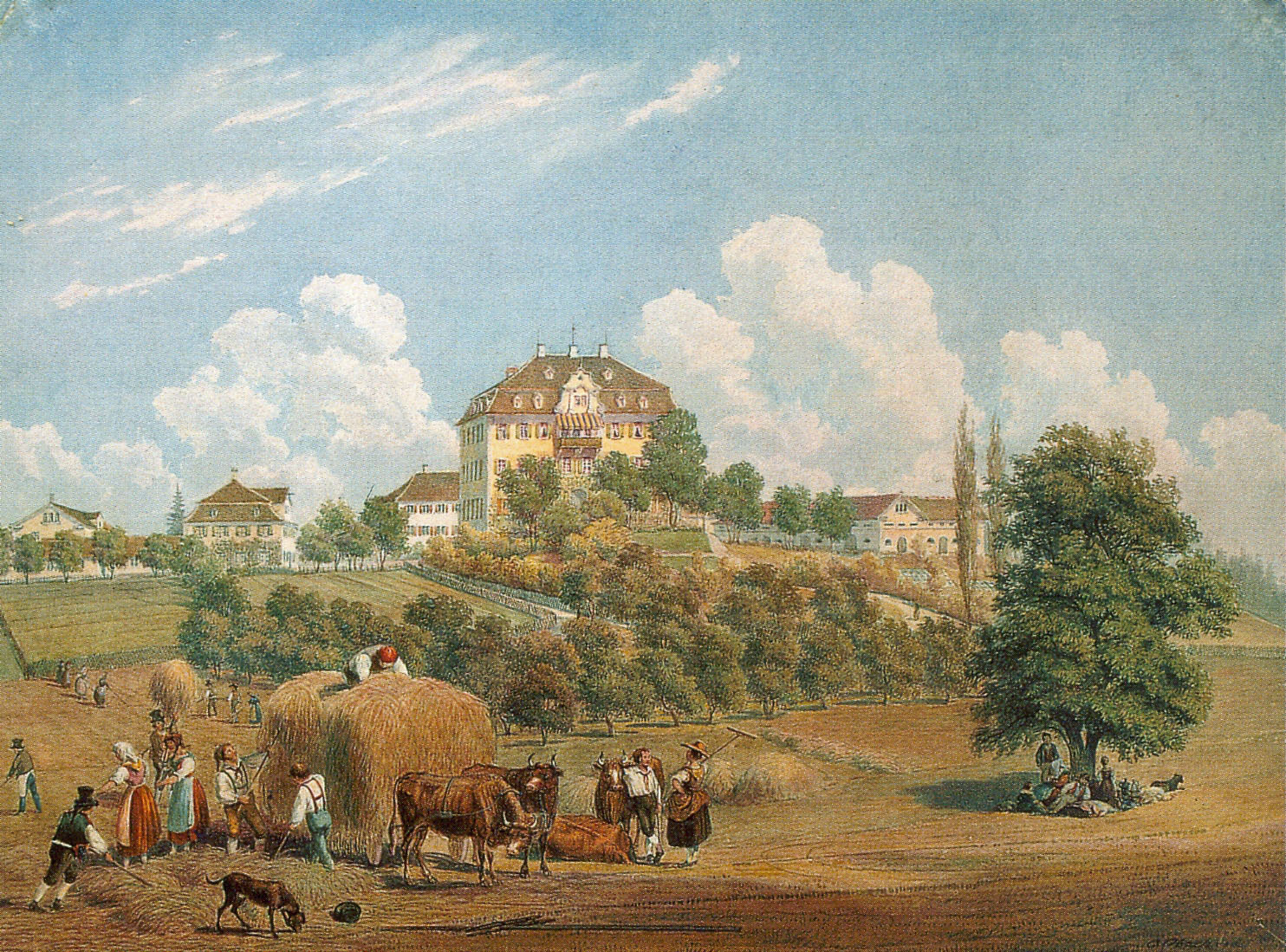 Schloss Neutrauchburg. Aquarell.